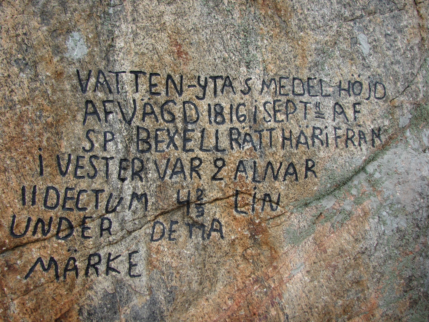 Inschrift des Steins in Glommen (Schweden).